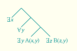 Made using XFIG